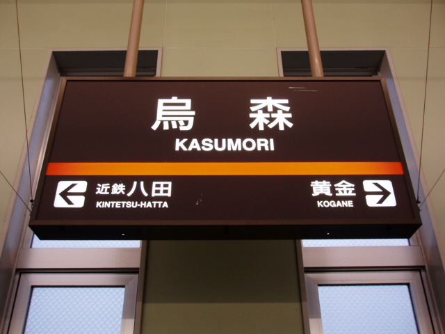 Kinki Nippon Railway Nagoya Line Kasumori Station Signboard 近畿日本鉄道名古屋線烏森駅駅名標